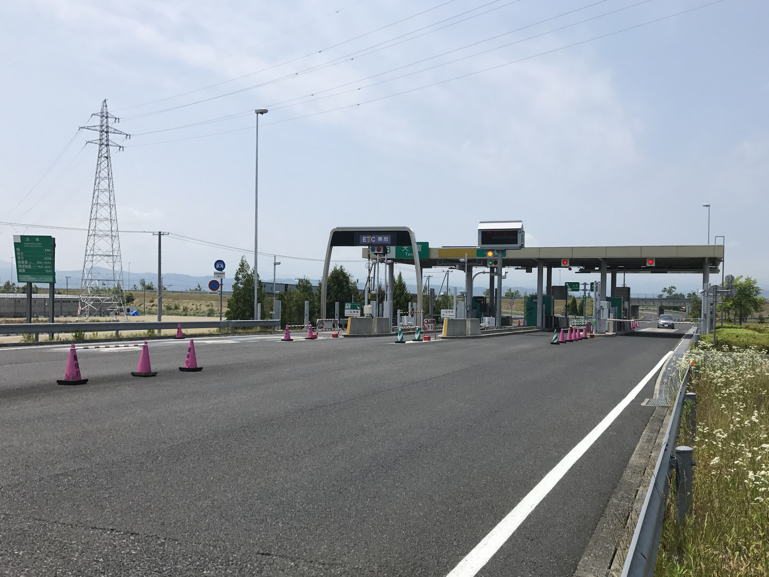 東北中央自動車道 天童IC 料金所